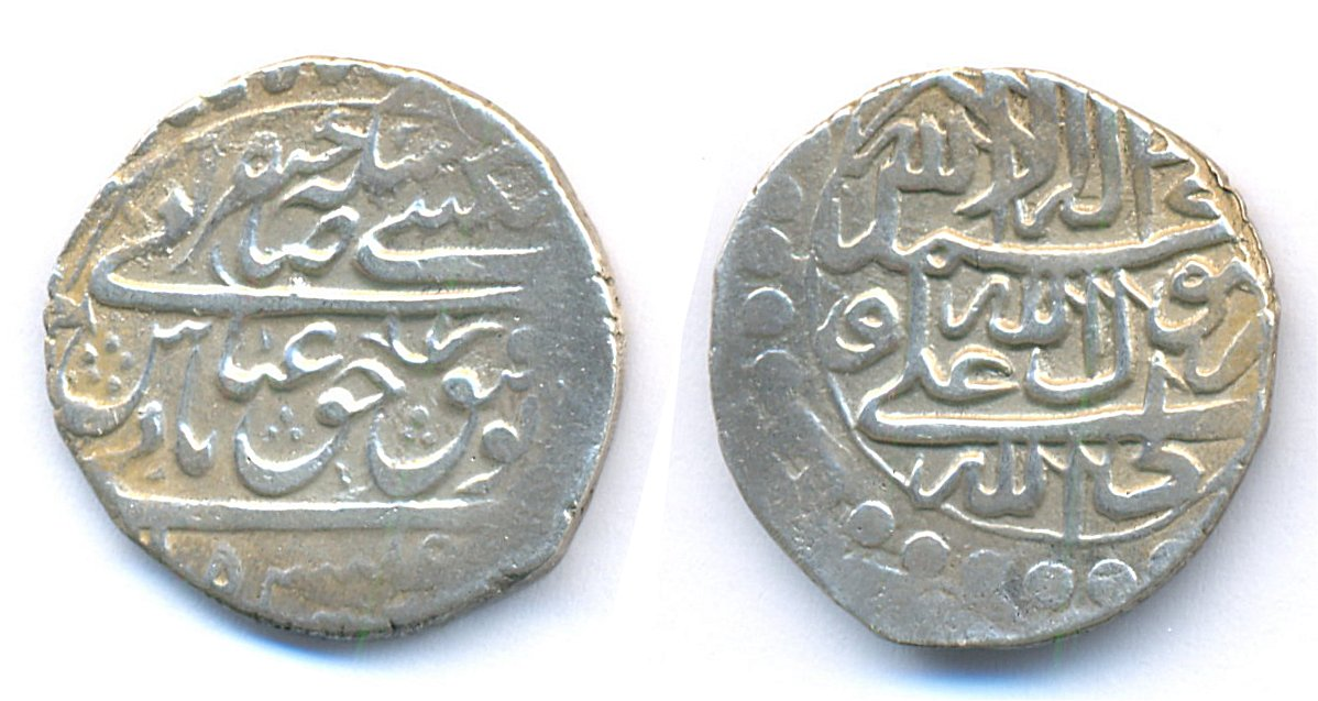 váha 5.68g, rozmer 21.9-22.7 mm